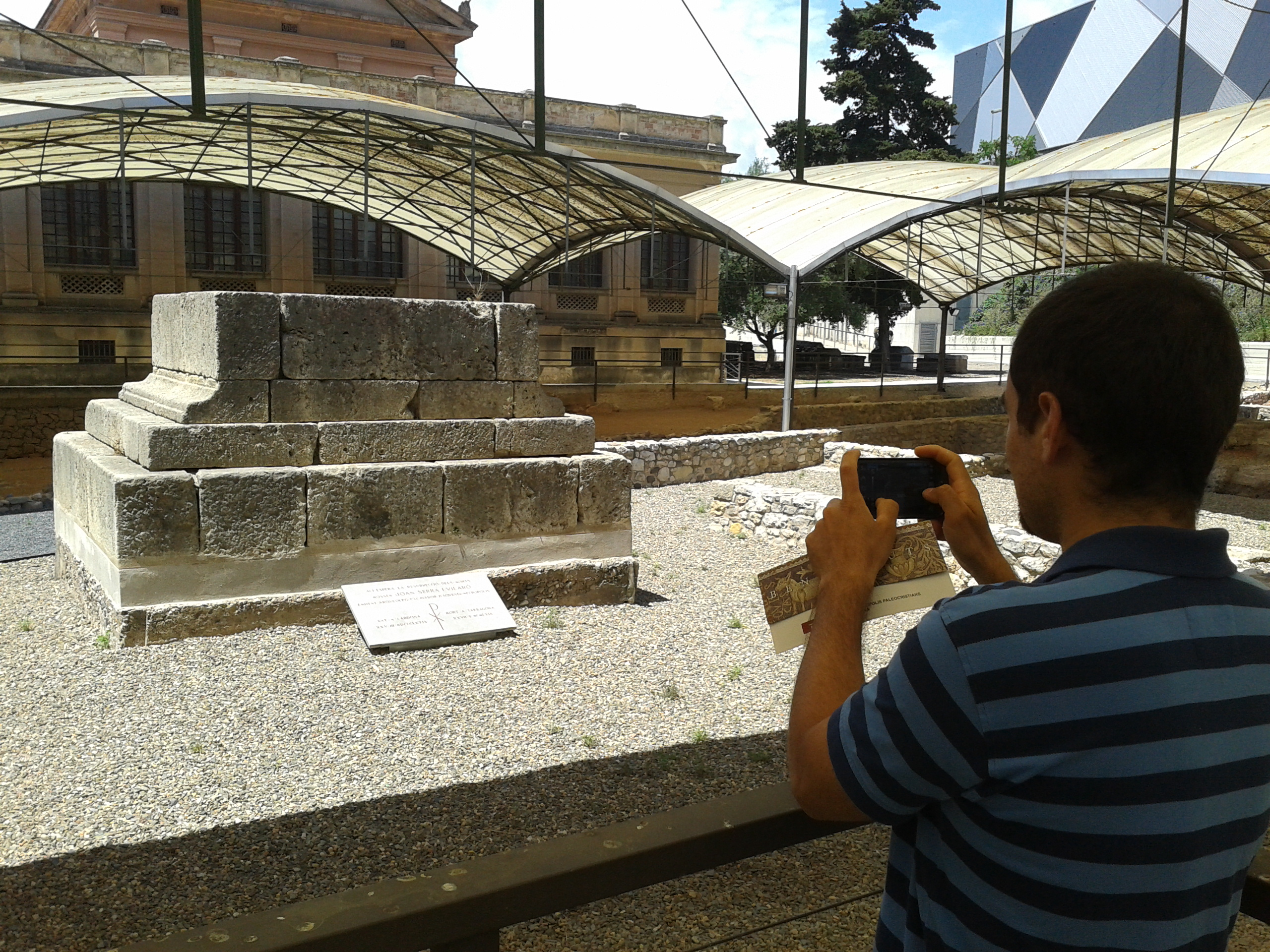 Monument al sepulcre de Joan Serra i Vilaró